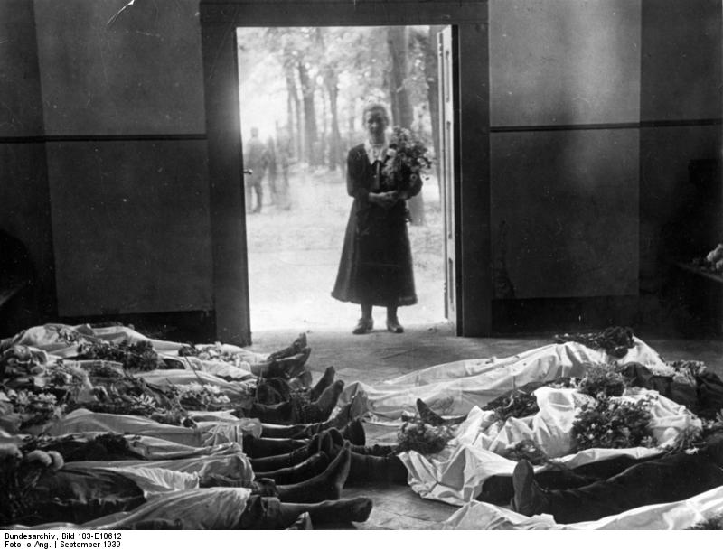 Note: This description has been identified as biased or incorrect: NS propaganda. Bromberg, Leichen getöteter Volksdeutscher Die Massenmorde von Bromberg - die Folgen Englands Blankovollmacht an Polen. Über Bromberg steht der Schatten des Todes. In den Straßen, Parks , Anlagen in Gräben und Hauseingängen, zwischen Hecken und Büschen liegen die Opfer polnischer Grausamkeit, die Leichen vieler hunderter von Volksdeutschen, mit deren Ermordung die Polen ihre Drohung nur zu schrecklich wahr gemacht haben, vor dem Einzug der Deutschen noch Rache zu nehmen. Widerliche bestialische für Menschen kaum denkbare Grausamkeiten sind, bevor die Opfer unter den Bajonetten und Gewehrläufen ihr Leben für Deutschlands Ehre und des Reiches Größe hingaben, an diesen Toten verübt worden. Weinend suchen die Angehörigen ihre Vermißten. Die schmerzgebeugten Frauen selbst hatten für ihre hingeschlachteten Männer und Söhne die Massengräber zu schaufeln begonnen, bis ihnen die einmarschierenden deutschen Soldaten diesen letzten Dienst für die unschuldigen Opfer des Polenhasses abnahmen. Die Geiselmorde von Bromberg, eine Folge der leichtfertigen englischen Blankovollmacht, wird allzeit ein Schandfleck in der Geschichte der polnischen Nation sein. 8.9.1939 [Polen.- Leichen getöteter Volksdeutscher (Opfer des "Bromberger Blutsonntag")] Information added by Wikimedia users. Nazi propaganda image allegedly showing victims of the Bloody Sunday